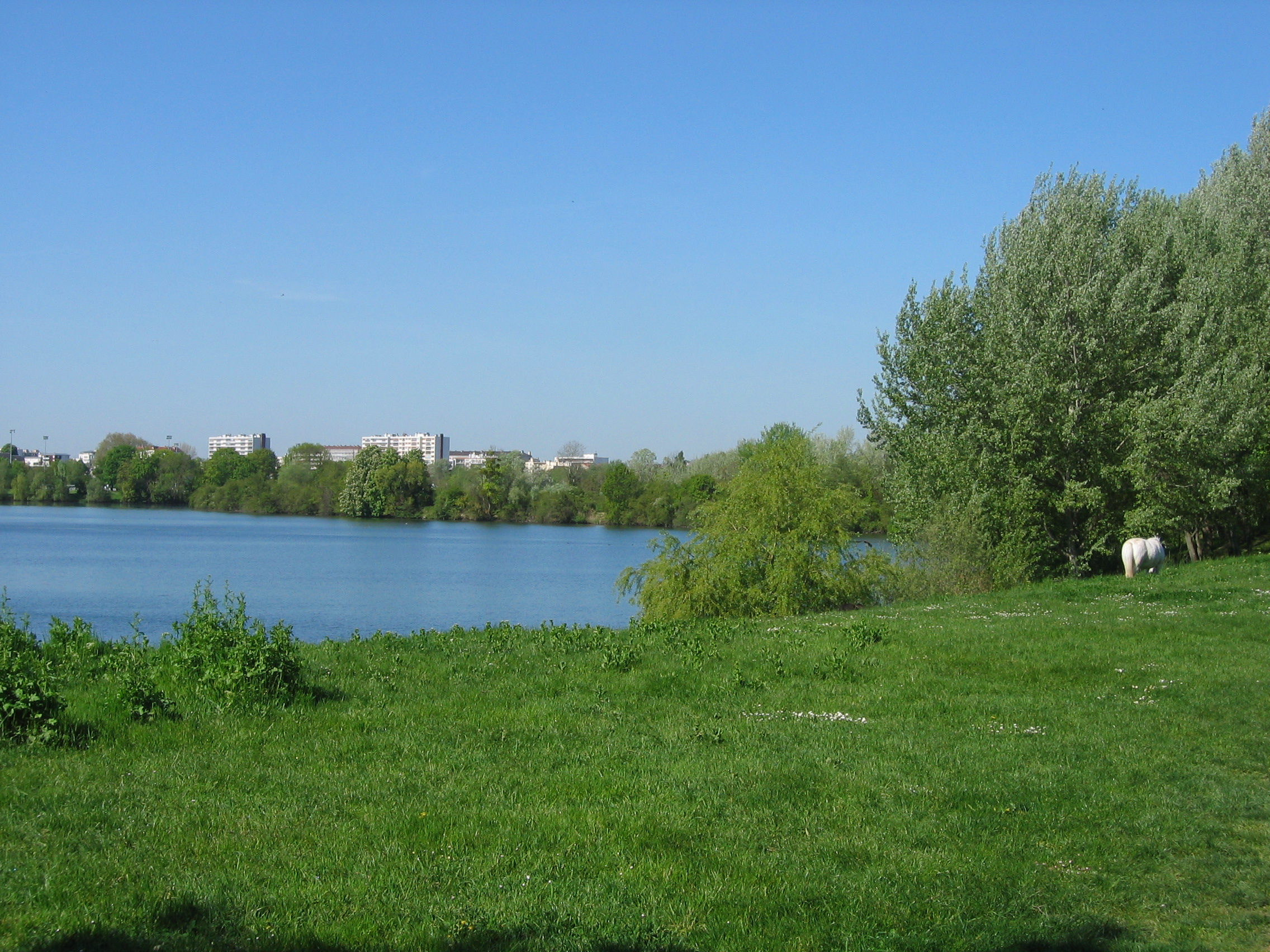 Base de plein air et de loisirs du Port-aux-Cerises